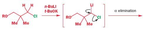 química orgânica avançada